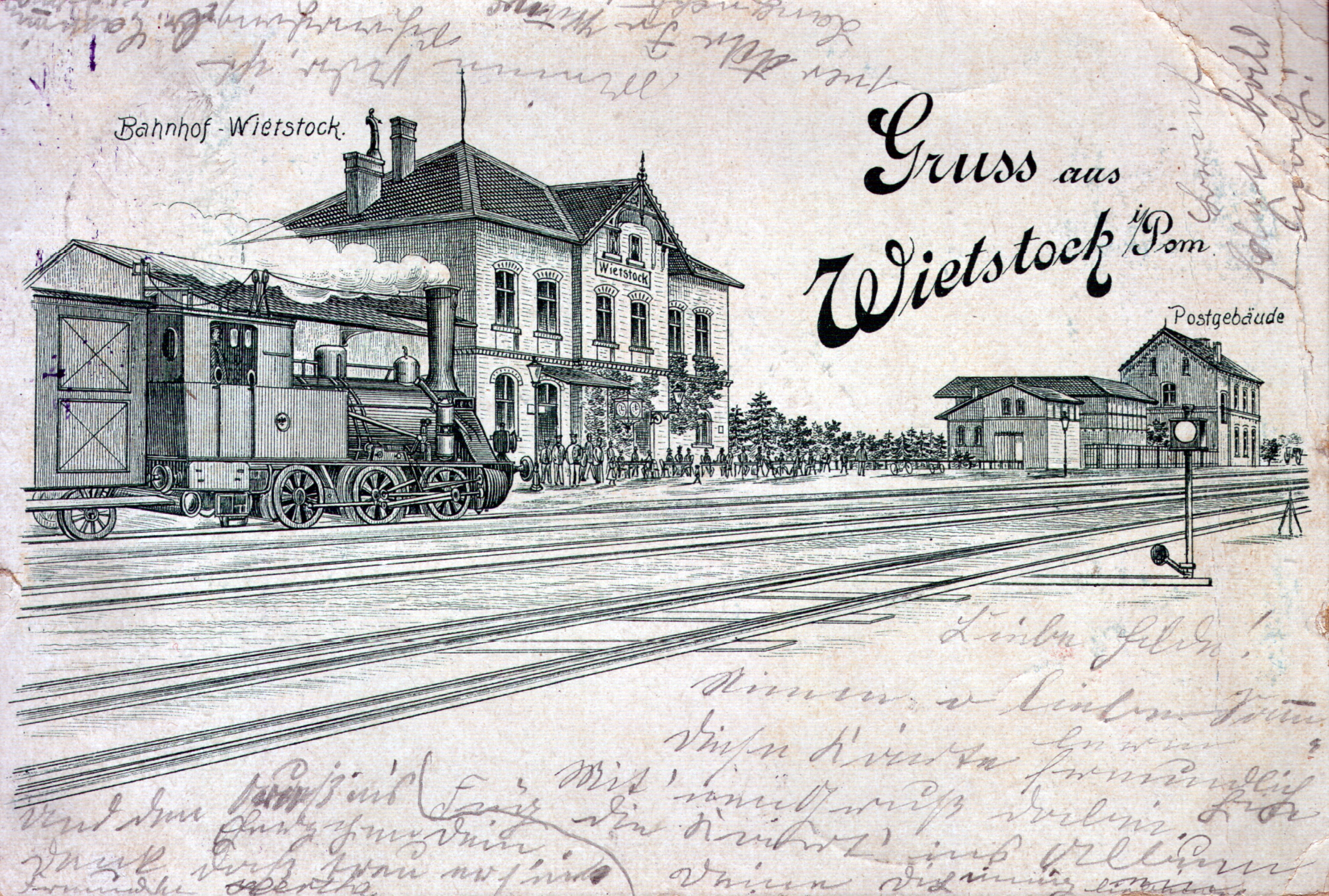 Widok na dworzec kolejowy w Wysokiej Kamieńskiej. Widokówka z roku 1902.